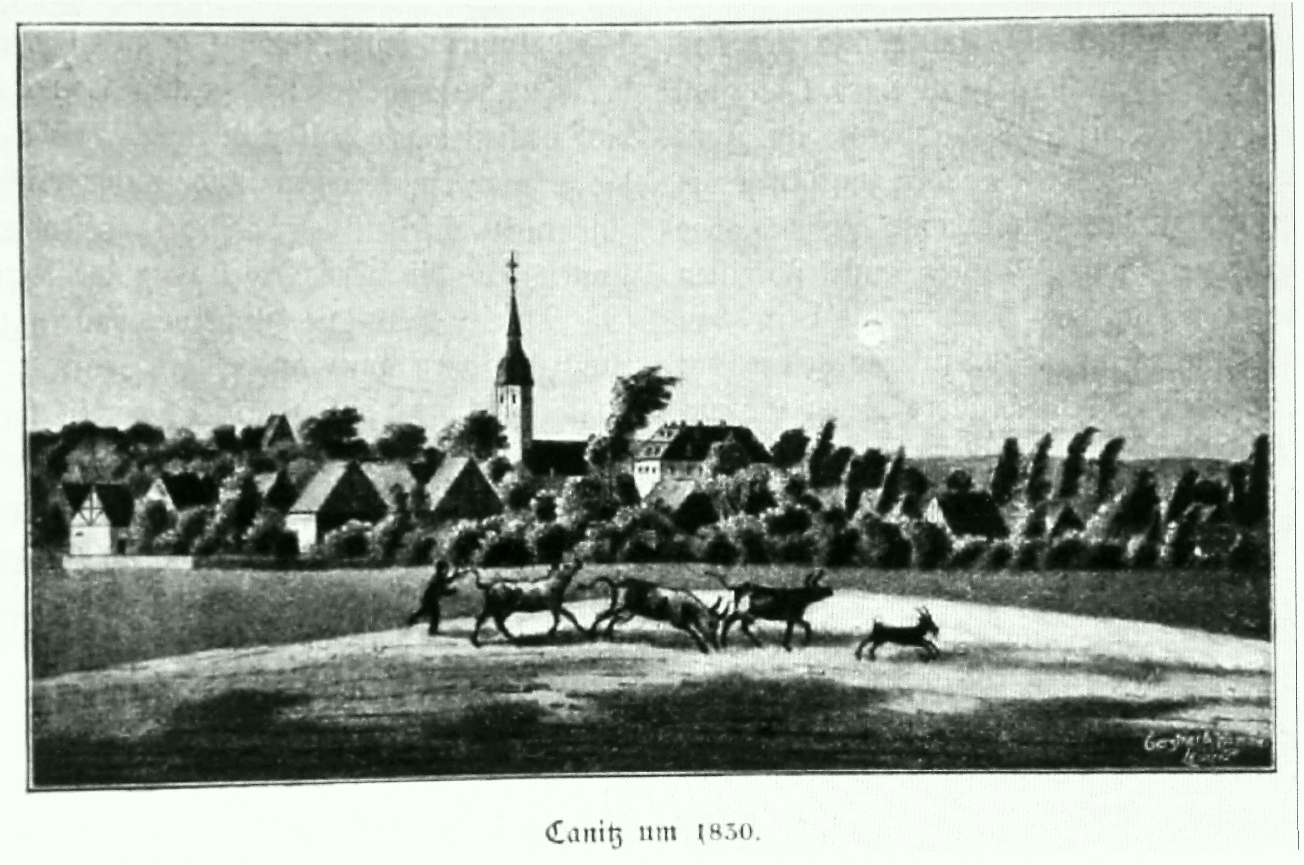 Ansicht Canitz um 1830, Scan aus: Steche; Sachsen Kirchen-Galerie, Die Inspektion Oschatz, Verlag von Hermann Schmidt, 1901, Band 3, S. 11